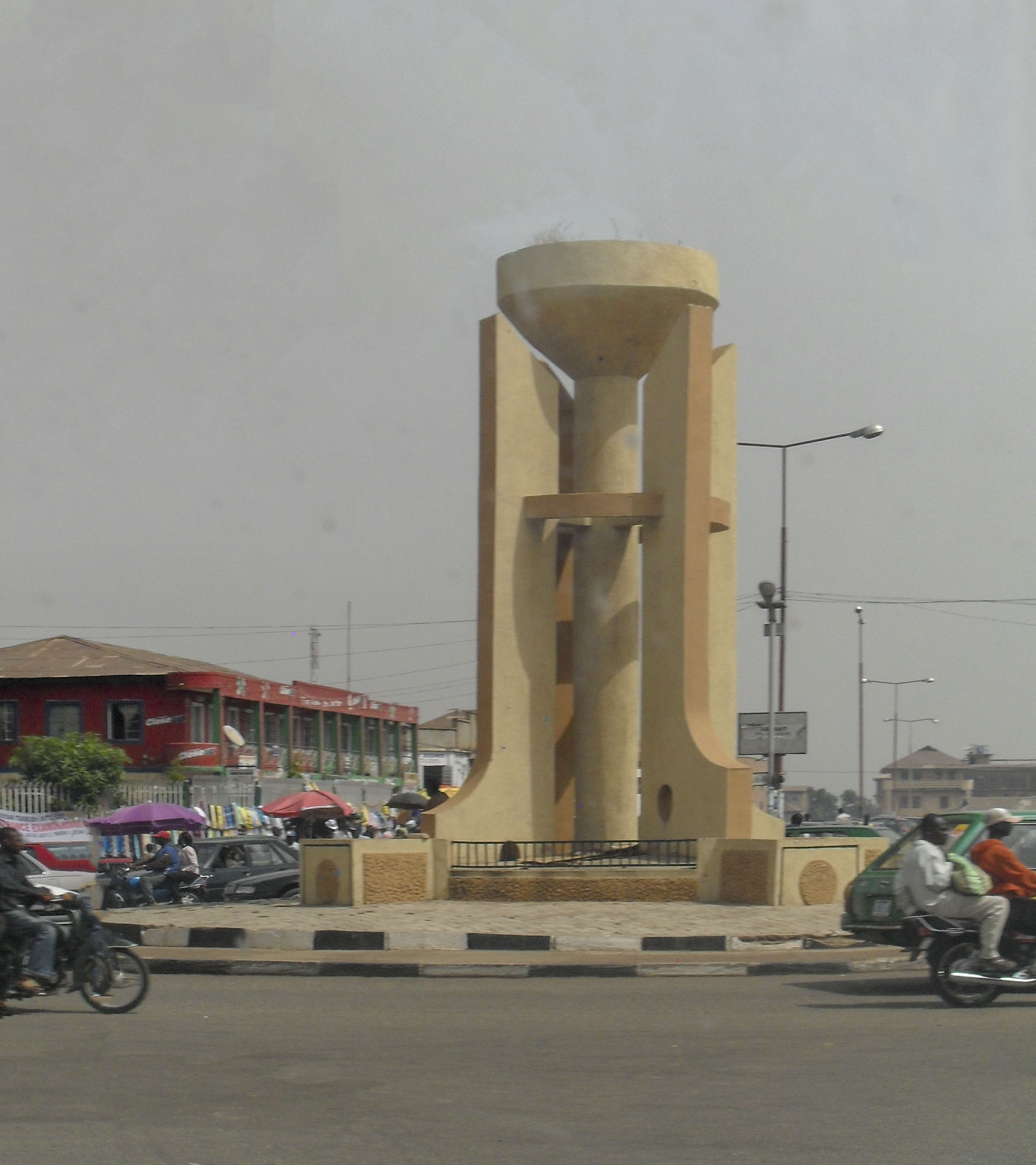 AHMADU BELLO WAY ROUND ABOUT JOS NIGERIA